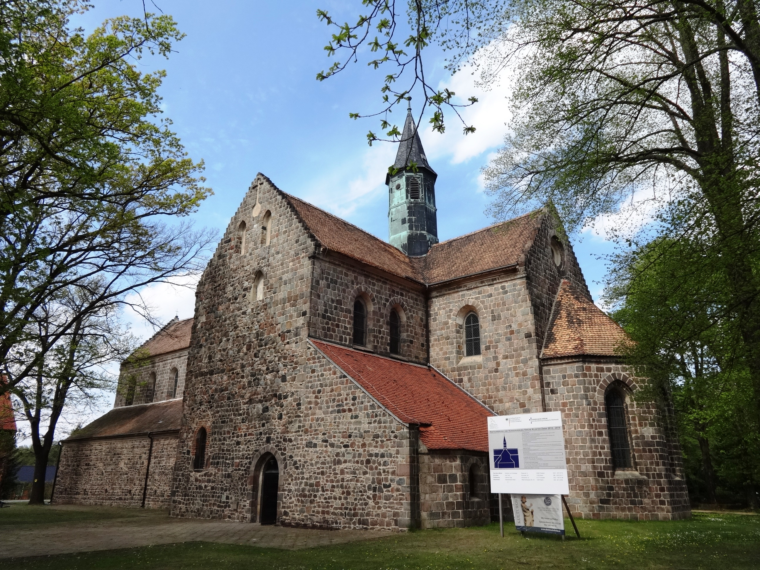 Die Klosterkirche St. Maria entstand im 12. Jahrhundert als Teil eines Zisterzienserklosters. Sie befindet sich in Jüterbog im Landkreis Teltow-Fläming in Brandenburg.